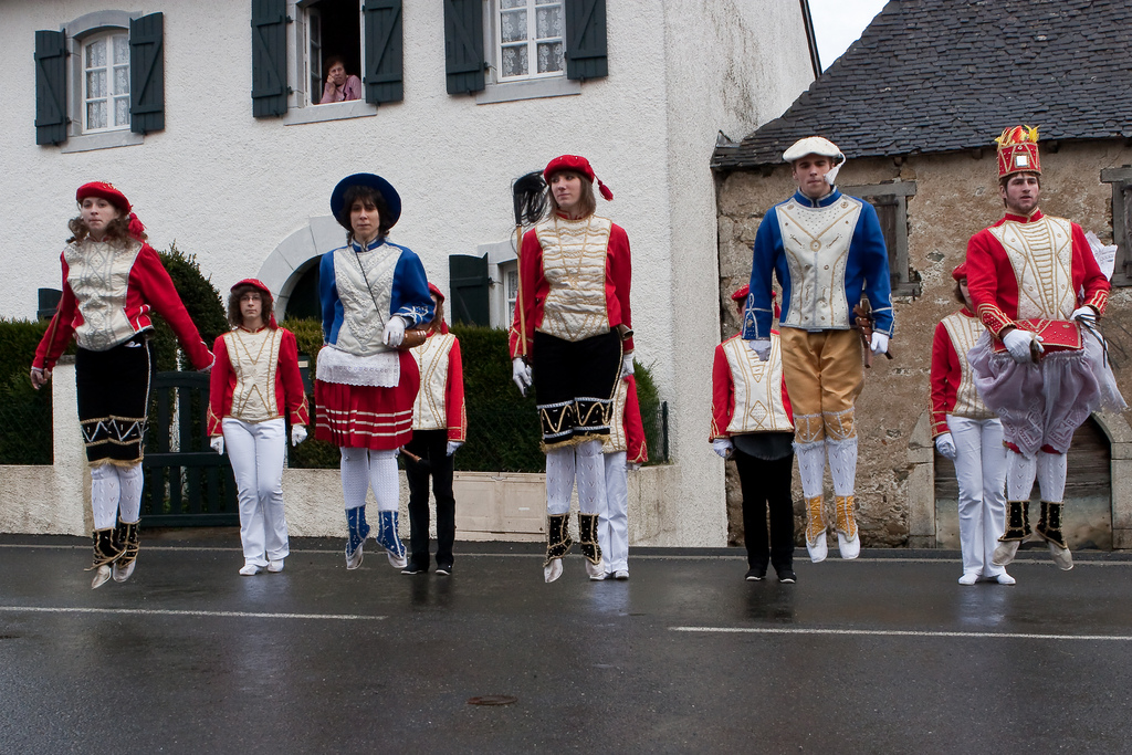 Larraineko maskarada. Aitzindariak. 2010-01-17